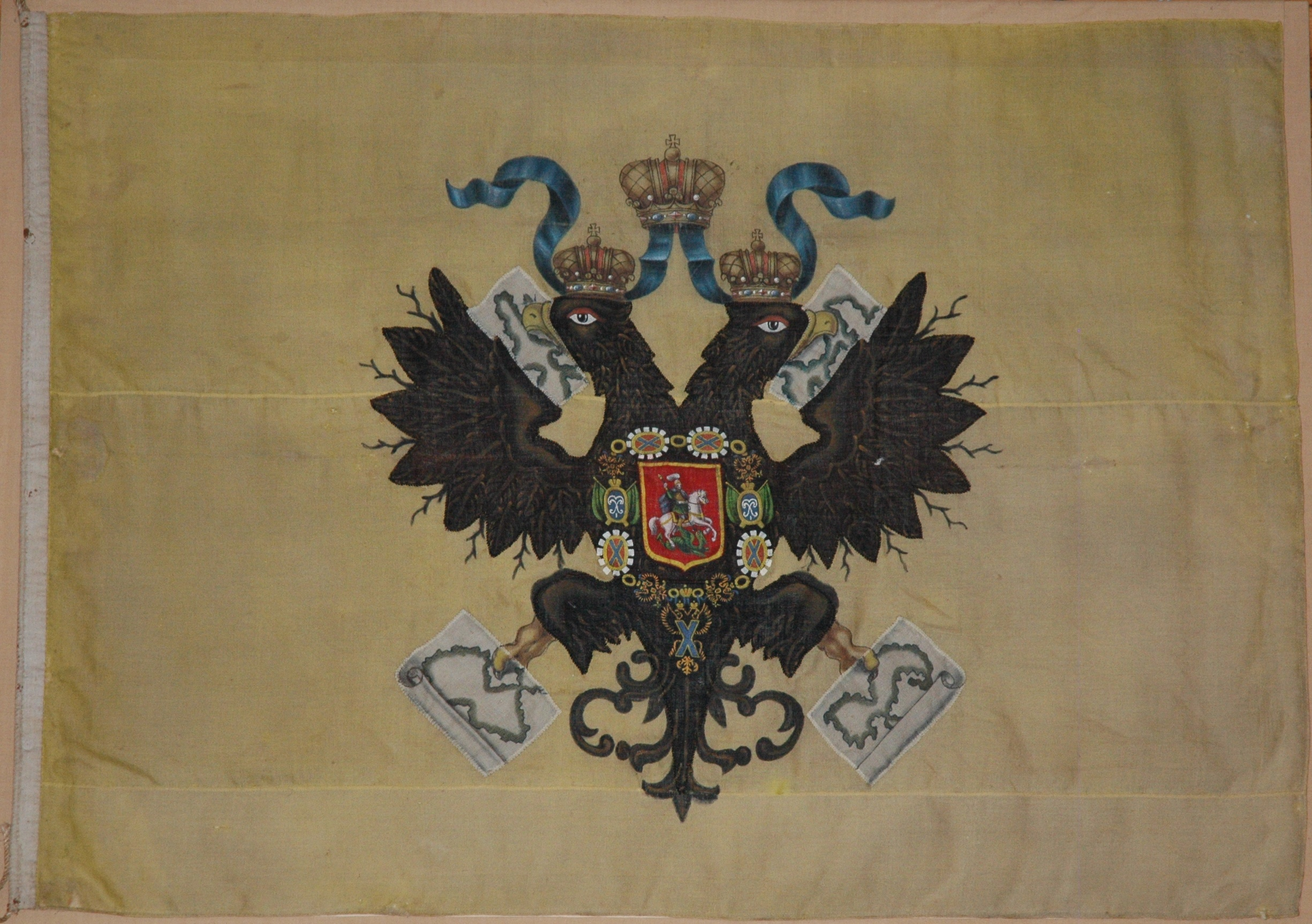 Russian Imperial Banner at Langinkoski Imperial Fishing Lodge